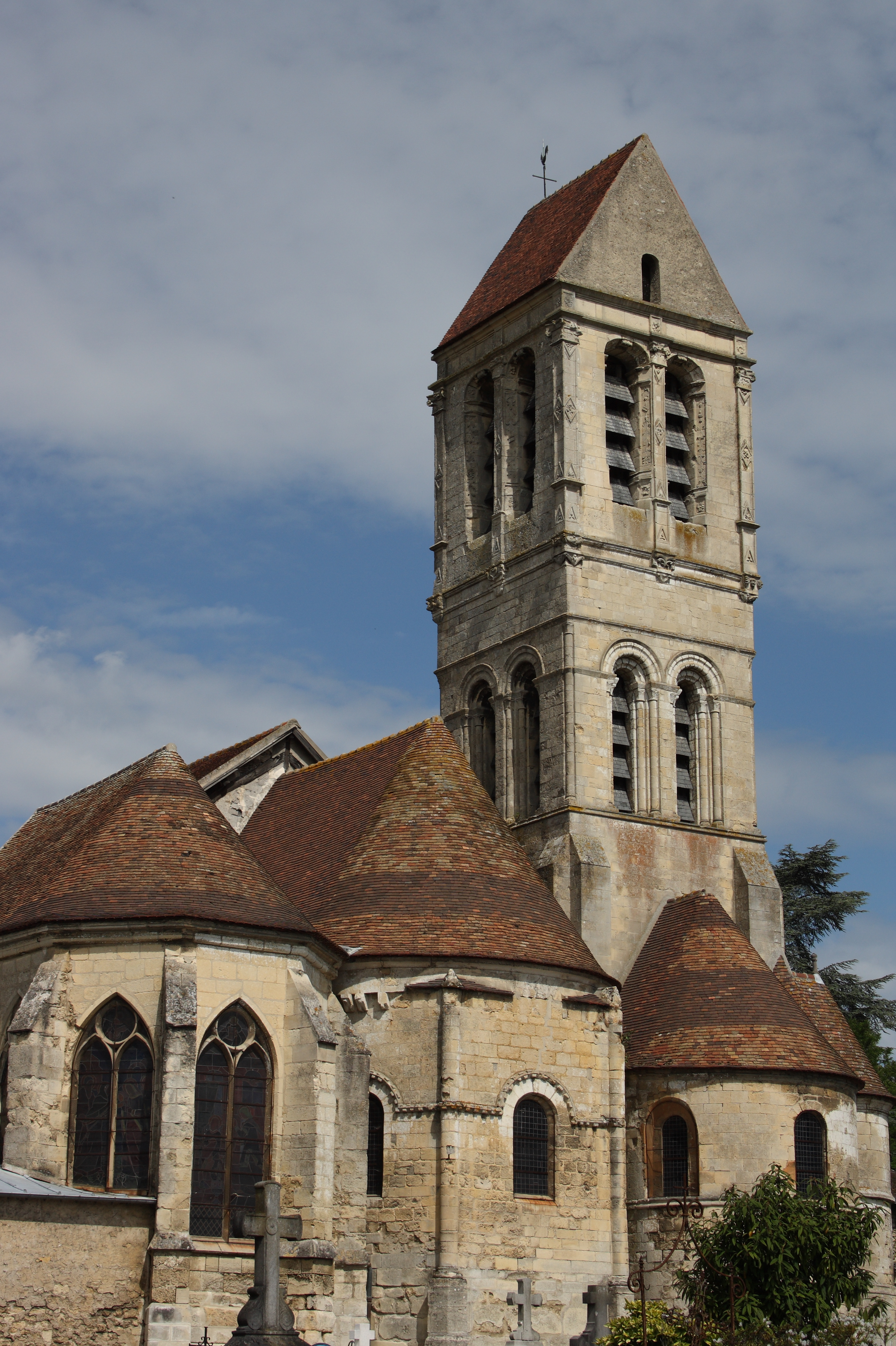 Katholische Kirche Saint-Côme-et-Saint-Damien in Luzarches, einer Gemeinde im Département Val-d'Oise (Île-de-France), Ansicht von Osten